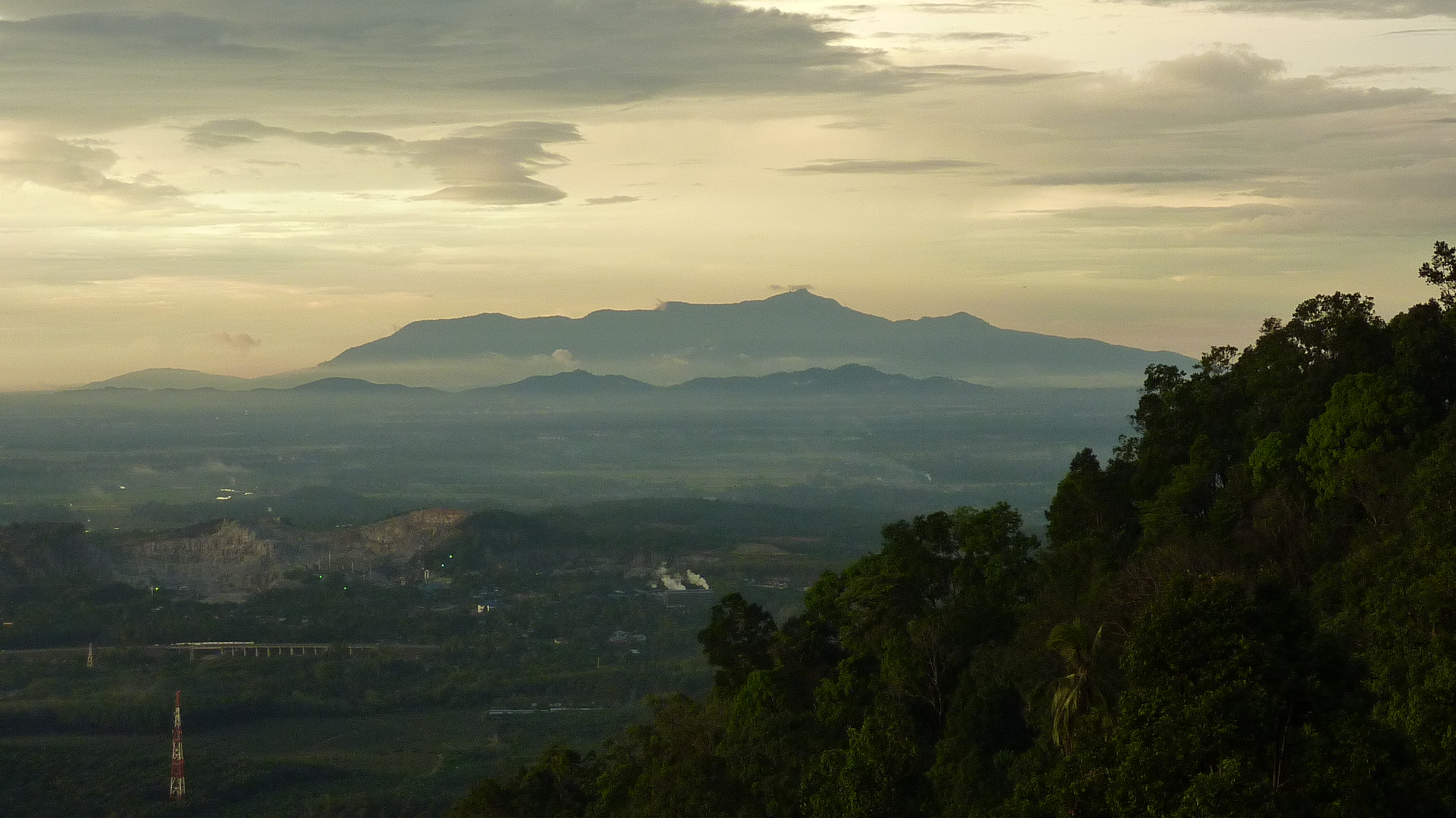 30 Bujang Valley and Mt. Jerai at Dusk, at Vivekavana Solitude Grove, Penang